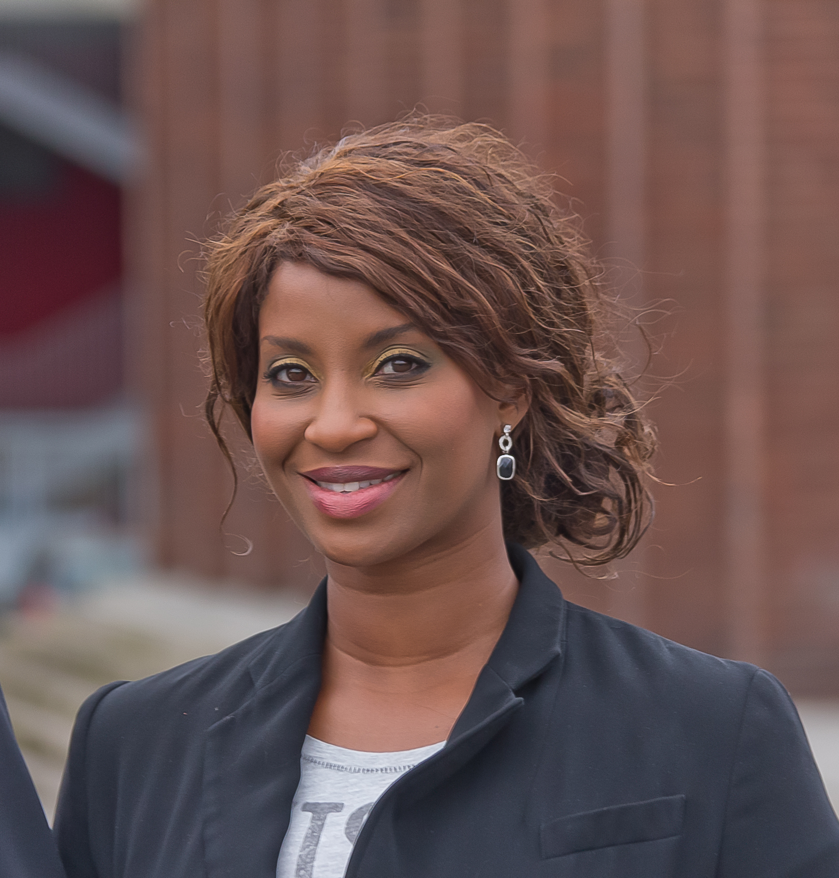 Pressegespräch im Sportamt der Stadt Köln: Vorstellung des Fan- und Familienfestes zum DFB-Pokalfinale der Frauen am 12. Mai 2012. Übergabe der Urkunden zur Ernennung von Janine Kunze und Liz Baffoe als Sportbotschafterinnen. Foto: Liz Baffoe